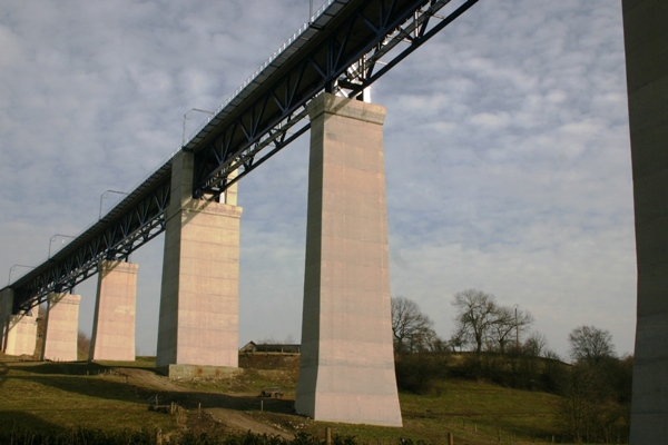 Viadukt vu Moresnet vu Norden.